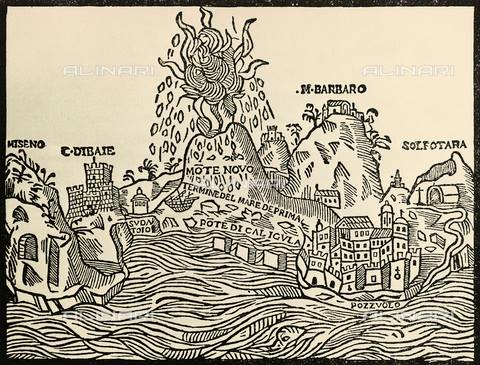 Delli Falconi Marco Antonio, Dell'incendio di Pozzuoli nel MDXXXVIII, Napoli 1538. L'opuscolo di Delli Falconi mostra nel frontespizio un'incisione con la veduta della costa dalla Solfatara fino al Capo Miseno, nella quale si riconoscono: Pozzuoli con il ponte caligoliano; Baia con il Castello Aragonese ed uno dei suoi grandi edifici termali; inoltre il Monte Barbaro con in cima la chiesa ed il convento di Sant'Angelo; infine, al centro dell'immagine, il Monte Nuovo in piena conflagrazione. Delli Falconi osservò l'eruzione dal mare in quanto, provenendo da Ischia, decise di fermarsi con la barca nel Golfo di Pozzuoli, attestandosi al largo nei pressi di Capo Miseno a circa quattro miglia dalla bocca eruttiva.